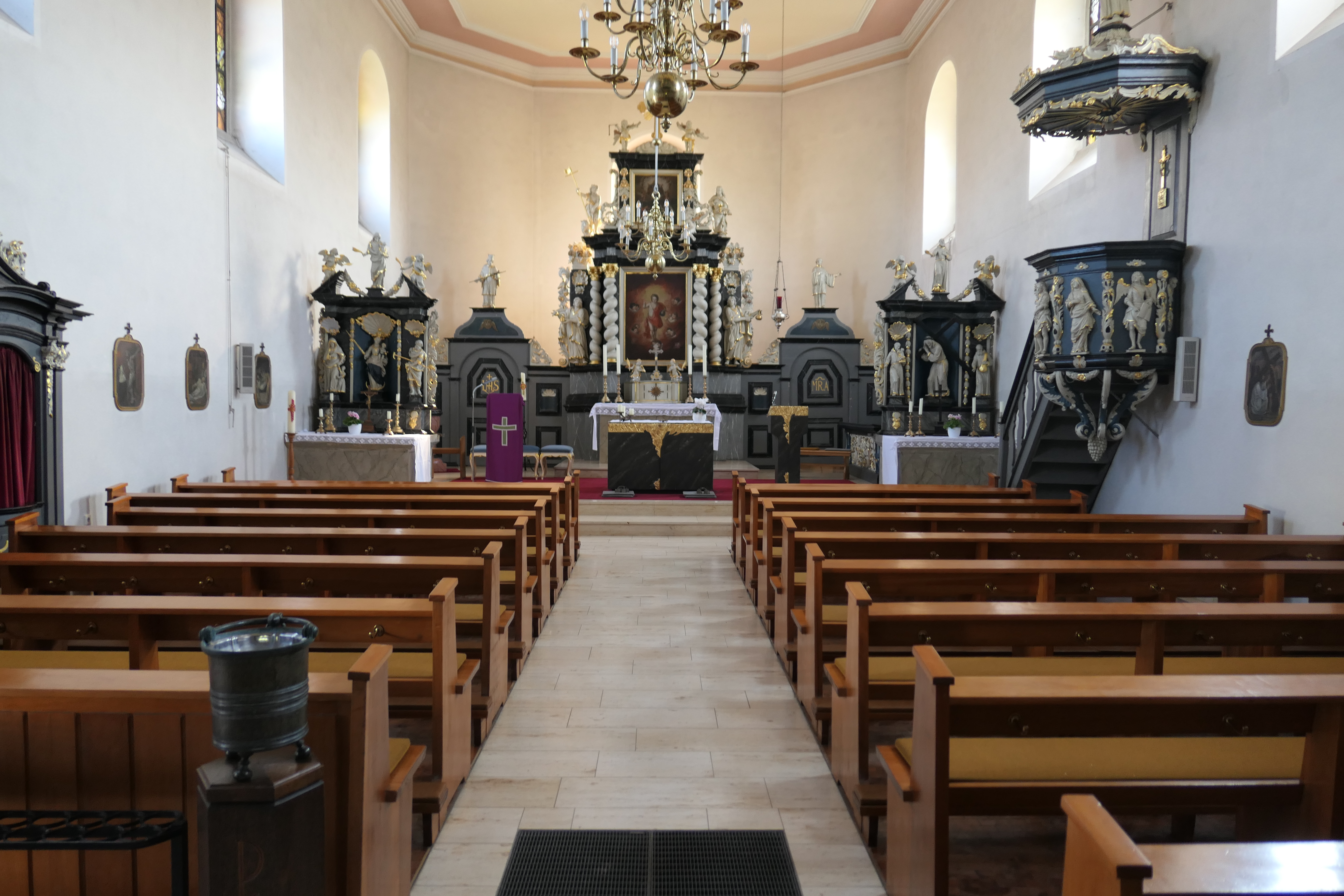 Inneres der kath. Pfarrkirche Wöhle